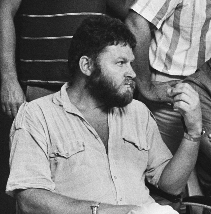 Collectie / Archief : Fotocollectie Anefo Reportage / Serie : Persconferentie van de VARA over het opheffen van de actualiteitenrubriek "Achter het Nieuws" Beschrijving : Varamedewerkers; zittend v.l.n.r. Jan Tromp, Hans Emmering, Hans Verploeg (voorzitter Nederlandse Vereniging van Journalisten), Frans Gottmer (dienstenbond FNV), staand rechts Henk van Hoorn Datum : 31 augustus 1983 Trefwoorden : actualiteitenprogramma's, persconferenties, reorganisaties, televisieprogramma's Persoonsnaam : Emmering, Hans, Gottmer, Frans, Hoorn, Henk van, Tromp, Jan, Verploeg, H.R. Fotograaf : Croes, Rob C. / Anefo Auteursrechthebbende : Nationaal Archief Materiaalsoort : Negatief (zwart/wit) Nummer archiefinventaris : bekijk toegang 2.24.01.05 Bestanddeelnummer : 932-6830